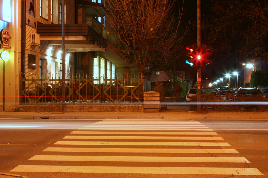 Drenikova v Ljubljani